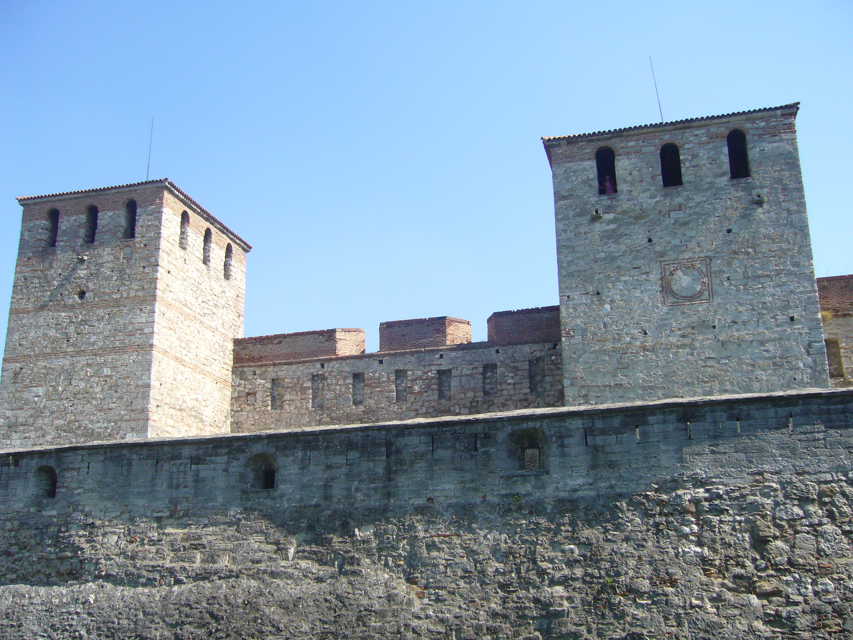 es el castillo de BABA VIDA en Vidin.